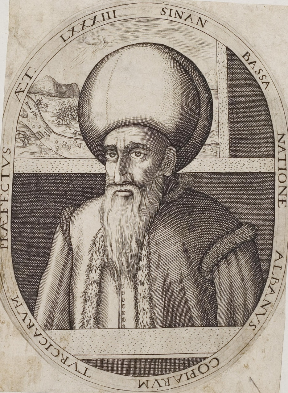 Grafik aus dem Klebeband Nr. 2 der Fürstlich Waldeckschen Hofbibliothek Arolsen Motiv: "Sinan Bassa Natione Albanus Copiarum Turcicarum Praefectus Aet LXXXIII" (Koca Sinan Pascha im Alter von 83 Jahren)